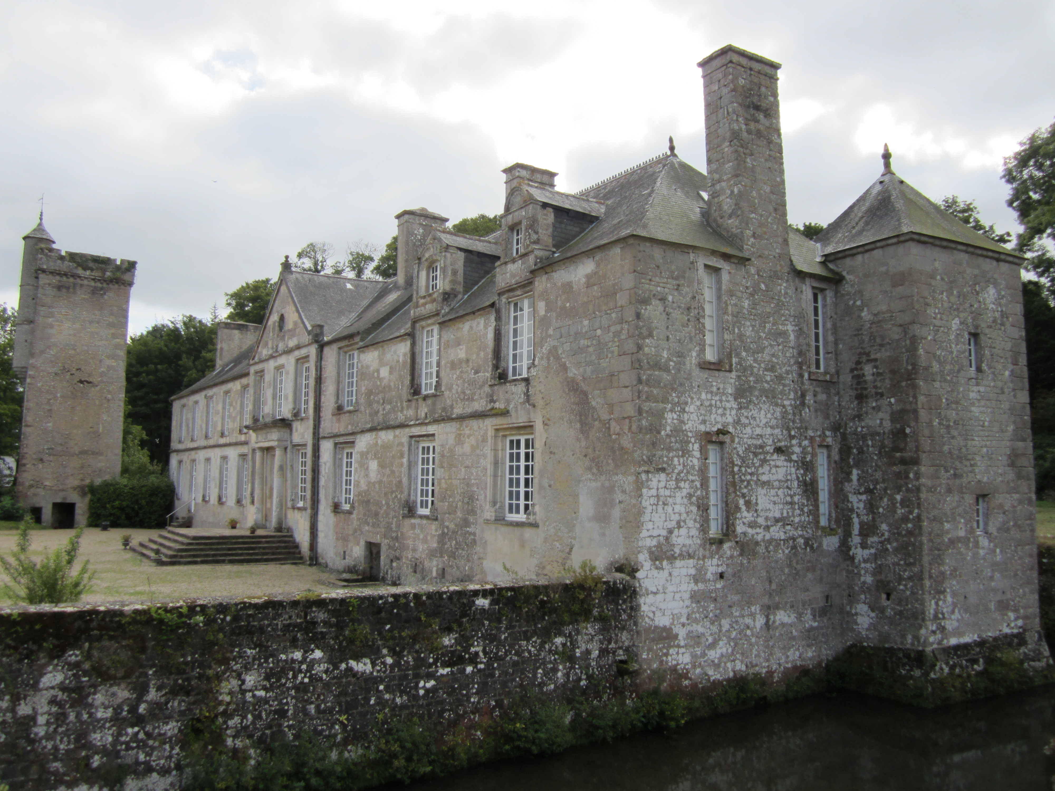 Château de Gonneville, France .